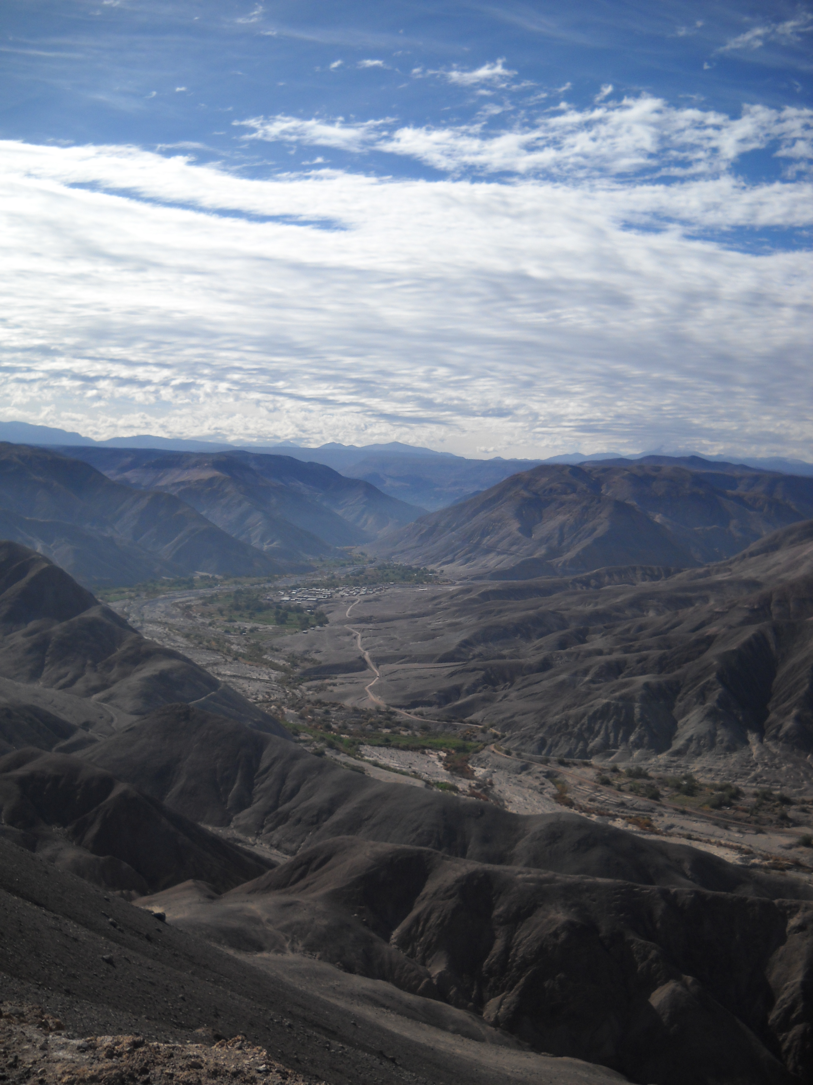 Localidad de Pachica, en la Quebrada de Tarapacá.